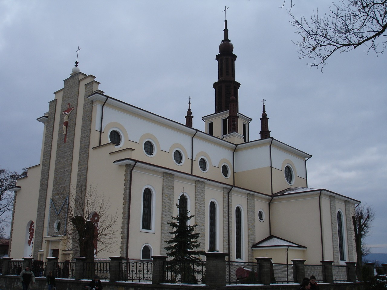 Kosciół parafialny w Dubiecku